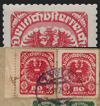 Propagandafälschung einer österreichischen 80 Heller Marke von 1920. Der Urheber ist unbekannt. Es wurde der Text der Originalmarke von "Deutschösterreich" in "Jüdischösterreich" verändert. Oben ein Ausschnitt der Originalmarke.